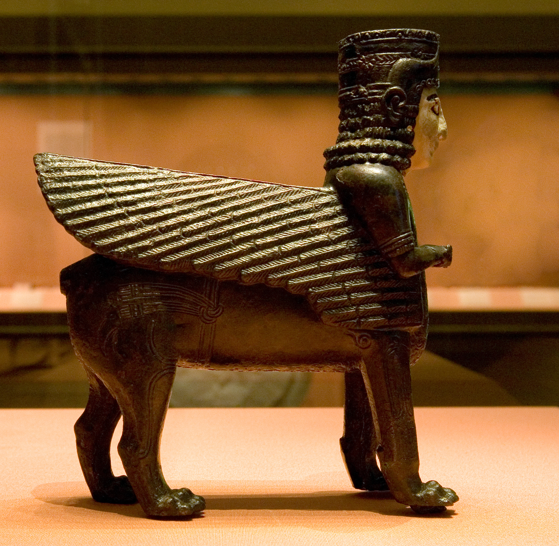 Բրոնզե արձանիկ թագավորական գահից.